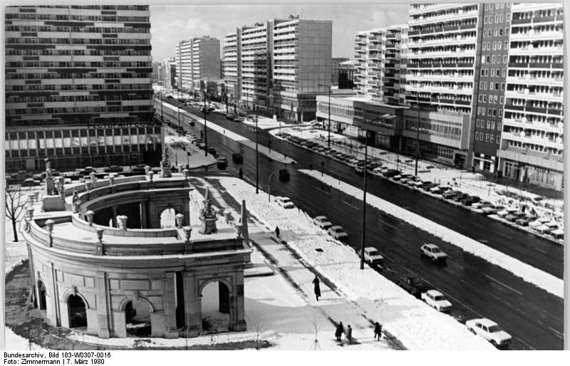 Berlin, Leipziger Straße, Spittelkolonnaden, Wohnblocks, Winter ADN-ZB Zimmermann 7-3-80 Berlin: Modernes und Historisches steht in der Leipziger Straße dicht beieinander. Die Spittelkolonnaden bilden einen reizvollen Kontrast zu den modernen Neubauten in diesem Viertel.